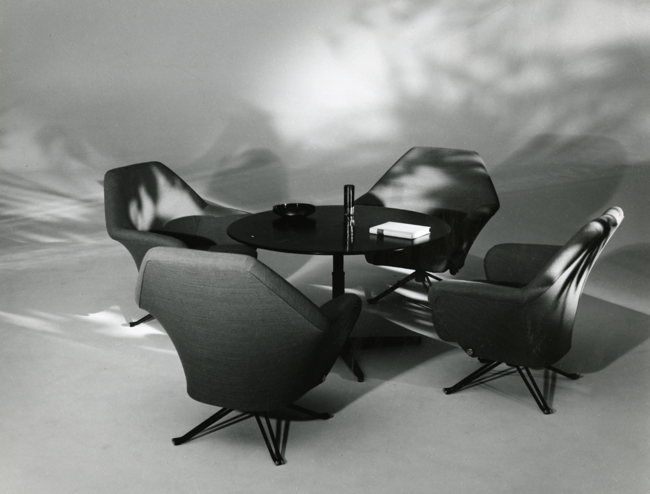 Servizio fotografico : Milano, 1963 / Paolo Monti. - Stampe: 8 : Positivo b/n, gelatina bromuro d'argento/ carta, 18x24, 24x30. - ((Al verso delle stampe impressi a inchiostro i numeri dei negativi corrispondenti: 43074 e i numeri inventariali secondo altra numerazione?: 2096 (lo stesso numero identifica 2 stampe - 2 copie), 2099, 2437 (riproduce lo steso soggetto delle stampe identificate con i nn. 2096); iscrizioni didascaliche e documentarie (date) (12.8.[19]57) manoscritte a matita e a penna in lingua francese ("Pavillon internationale"); timbri a inchiostro con copyright (Foto "Fotogramma" s.r.l. - Via Colonna - Milano e "Studio 22" - Corso Sempione - Milano); timbro di esposizione?: "Postzollamt/ Stuttgart". - Sul coperchio della scatola iscrizione didascalica manoscritta a pennarello nero: "Umbria". - Partecipazione ad una mostra con stampa b/n 24x30 cm, identificata con il n. 2096 e intitolata "Tavolo Tecno"? (cfr. timbro al verso: "Postzollamt/ Stuttgart"). - Fonte: Agenda di Paolo Monti: R 1 - Monti/ 1 aprile 1963 - 6 giugno 1964/ 6000-8193 (1963-1964), presso Archivio Paolo Monti